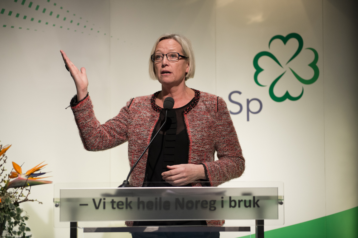 Marit Arnstad på Senterpartiets landsmøte i 2013